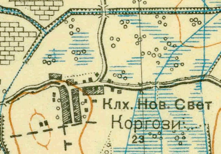 Топографическая карта Ленинградской области, квадрат О-36-13-А-г, деревня Коргузи